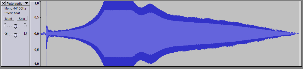 Piste audio du fichier larsen.ogg.